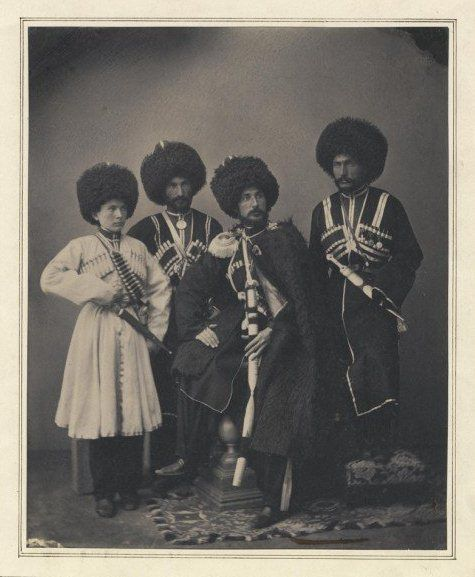 Ермоловы-младшие пошли отцовской стезей, все сделались офицерами, все успели повоевать на родном Кавказе. Виктор сделался генералом-лейтенантом и "превосходительством", Клавдий вышел в отставку генерал-майором, Северьян дослужился до полковника. Всех, кроме рано погибшего Петра, Ермолов женил, от всех дождался внуков, всех внуков дедушка-генерал любил и баловал.